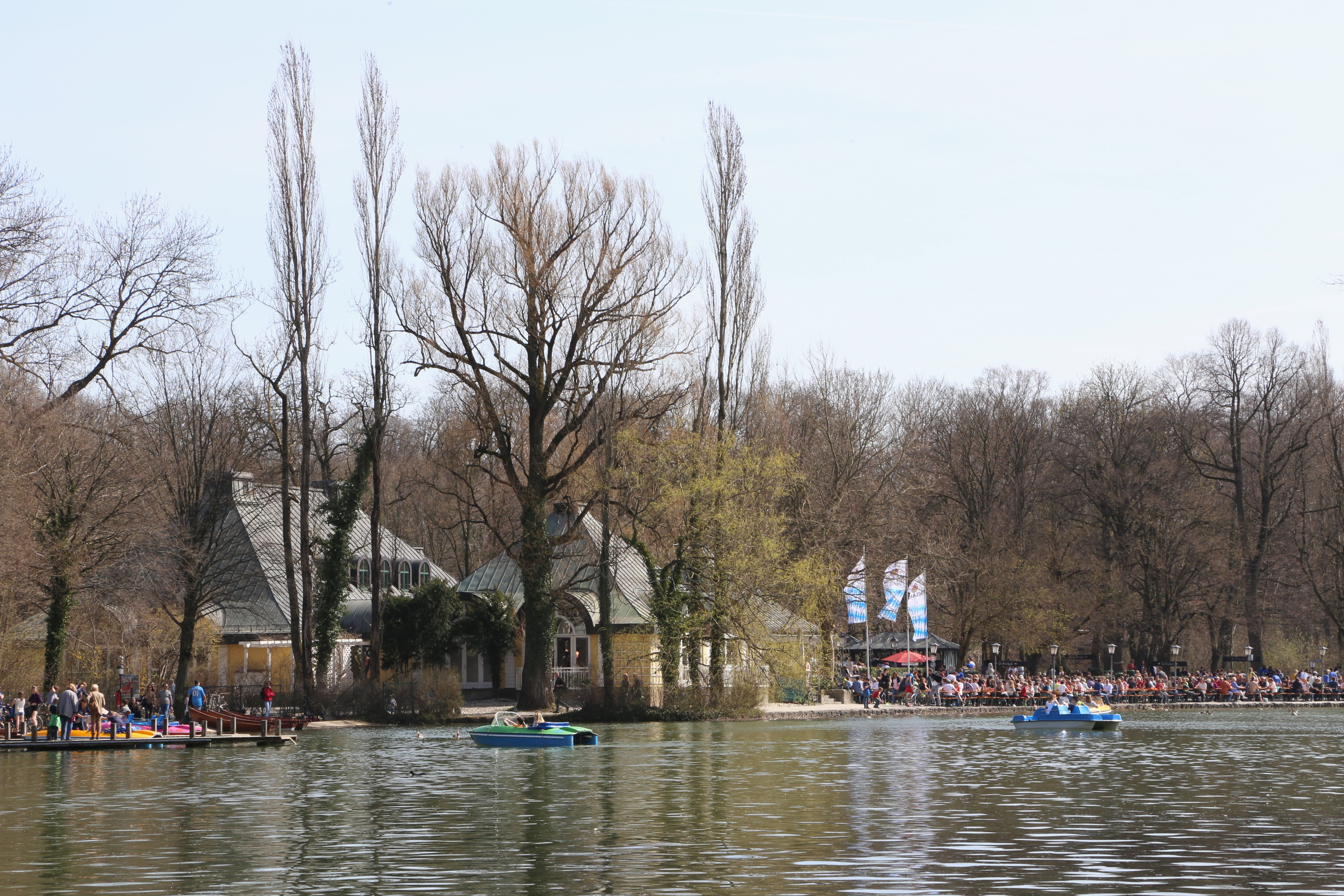 Seehaus am Kleinhesseloher See, Englischer Garten, München